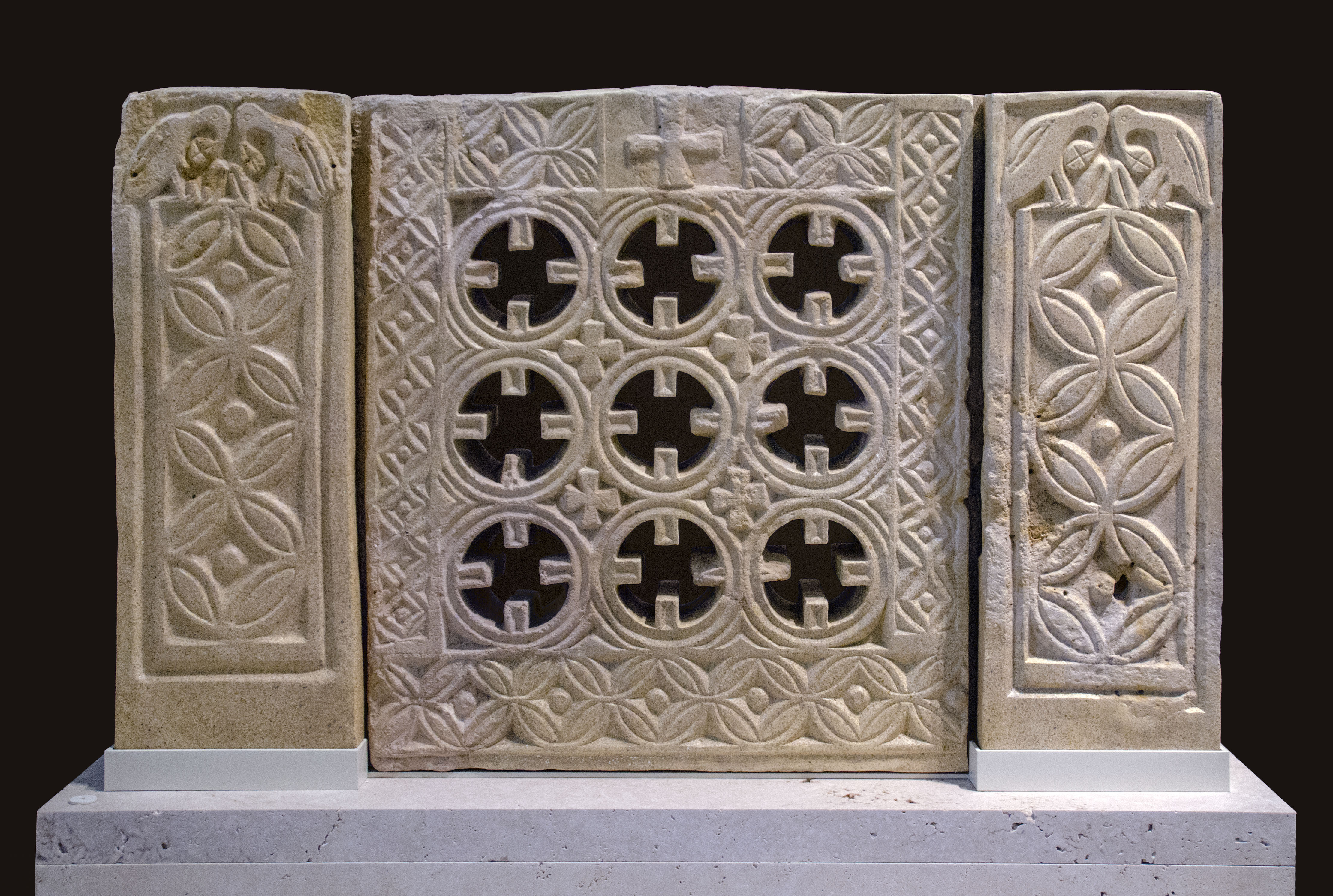 Reconstrucción de un cancel hecho a partir de una docena de fragmentos originales. Proceden de una basílica en Recópolis, ciudad fundada por Leovigildo en la actual Zorita de los Canes, Guadalajara.